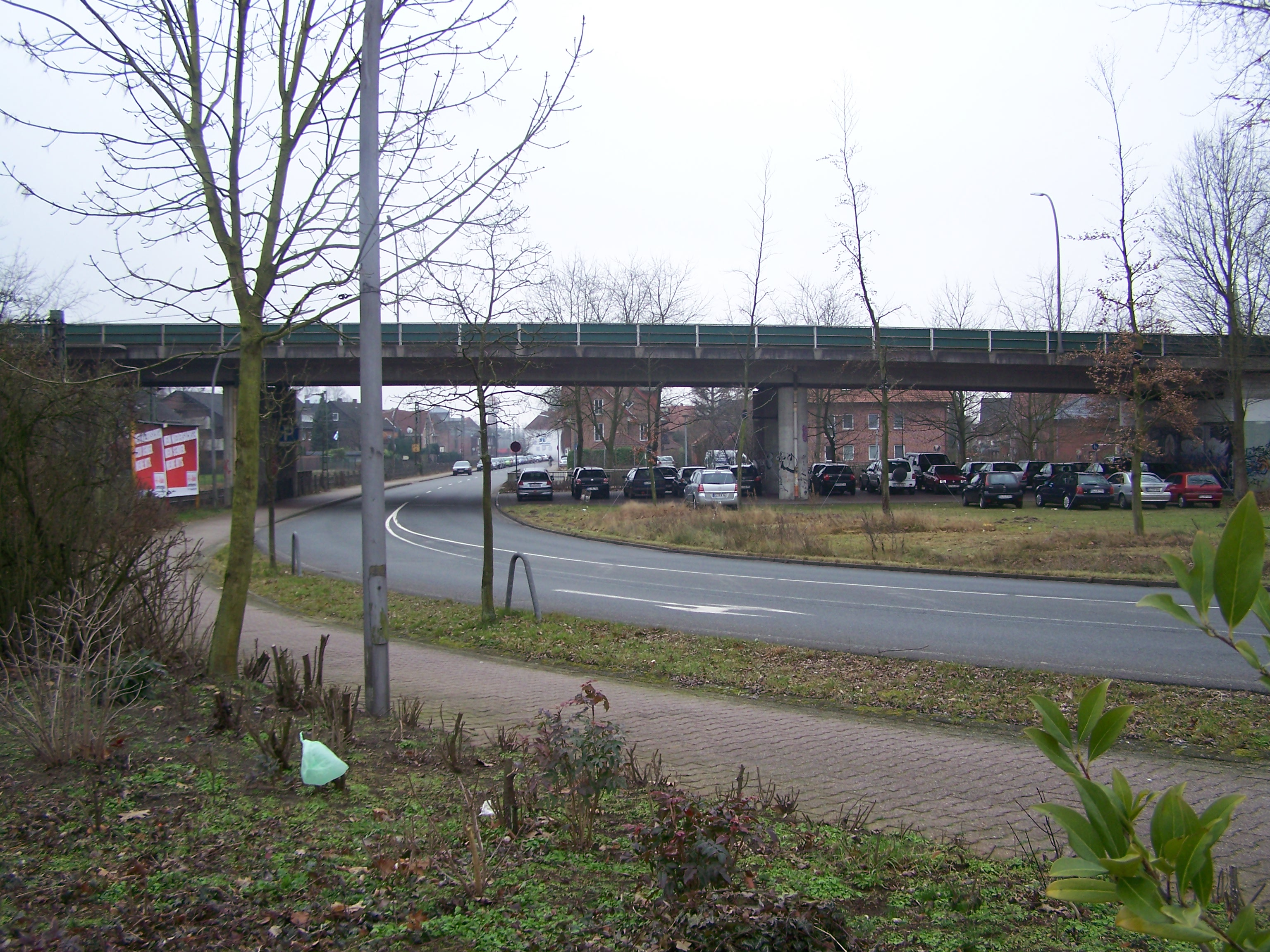 Ungefährer Standort des Kleinbahnhofes Lingen an der Straßenbrücke zur B 70